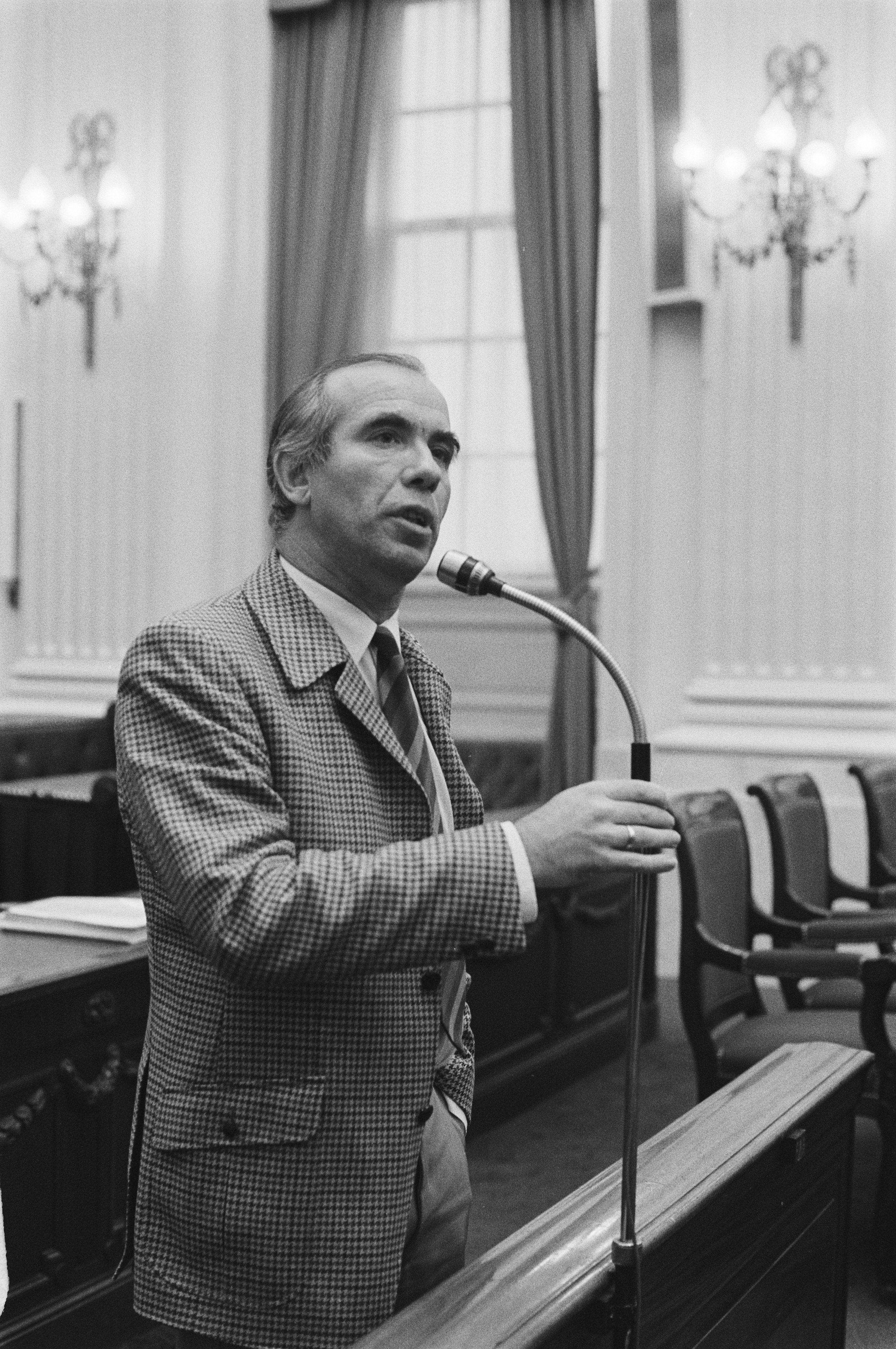 Collectie / Archief : Fotocollectie Anefo Reportage / Serie : [ onbekend ] Beschrijving : Tweede Kamer , debat over tweeverdieners; ds. Aad H. D. Wagenaar (Kamerlid RPF) Datum : 31 oktober 1984 Trefwoorden : kamerdebatten, kamerleden Persoonsnaam : Ds. Aad H. D. Wagenaar Instellingsnaam : Tweede Kamer Fotograaf : Croes, Rob C. / Anefo Auteursrechthebbende : Nationaal Archief Materiaalsoort : Negatief (zwart/wit) Nummer archiefinventaris : bekijk toegang 2.24.01.05 Bestanddeelnummer : 933-1323